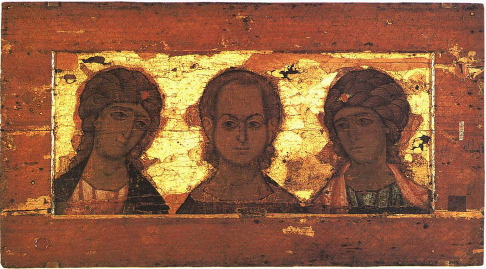 Спас Эммануил с архангелами (ангельский деисус) Икона находилась над северными вратами в центральном иконостасе Успенского собора Московского Кремля. Возможно, вывезена из Владимира. Собрание ГТГ, инв. № ДР-1192 72 х 129 В левом нижнем углу иконы – красная сургучная печать Успенского собора Московского Кремля. Икона имеет редко встречаемую вытянутую по горизонтали форму. Спас Эммануил (еврейск. – «с нами Бог») – изображение Христа-отрока с архангелами, что связано с символикой евхаристической жертвы. Подобные композиции помещались в алтаре или жертвеннике. На полях, в местах утраты левкаса, видны насечки дерева, которые делались для прочной связи грунта и основы.